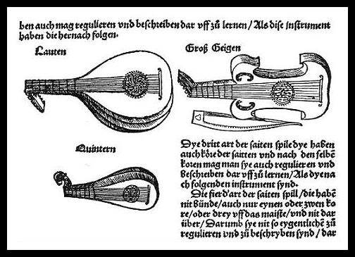 Illustração do tratado "Musica Getutsch", de Sebastian Virdung, 1511, Alemanha, mostrando os instrumetnos da família do alaúde, tocados por vibração (plectro) ou arco. Primeira ilustração impressa de uma viola da gamba (ou vihuela de arco) na história.